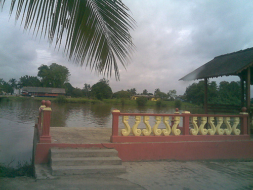 Kampung Brohol, Pagoh